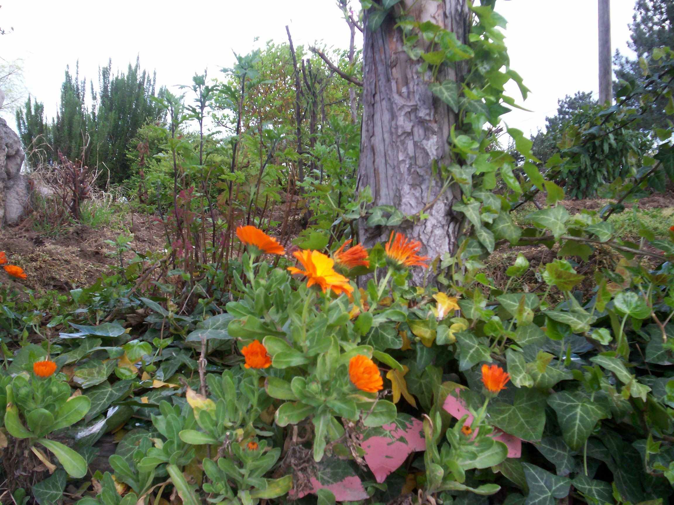 Kendi fotoğraf makinemle çektim.